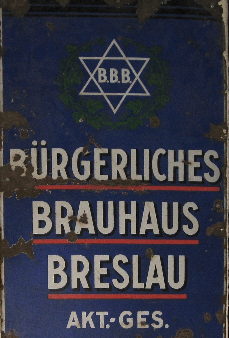 Bürgerliches Brauhaus Breslau - reklama dawnego browaru wrocławskiego